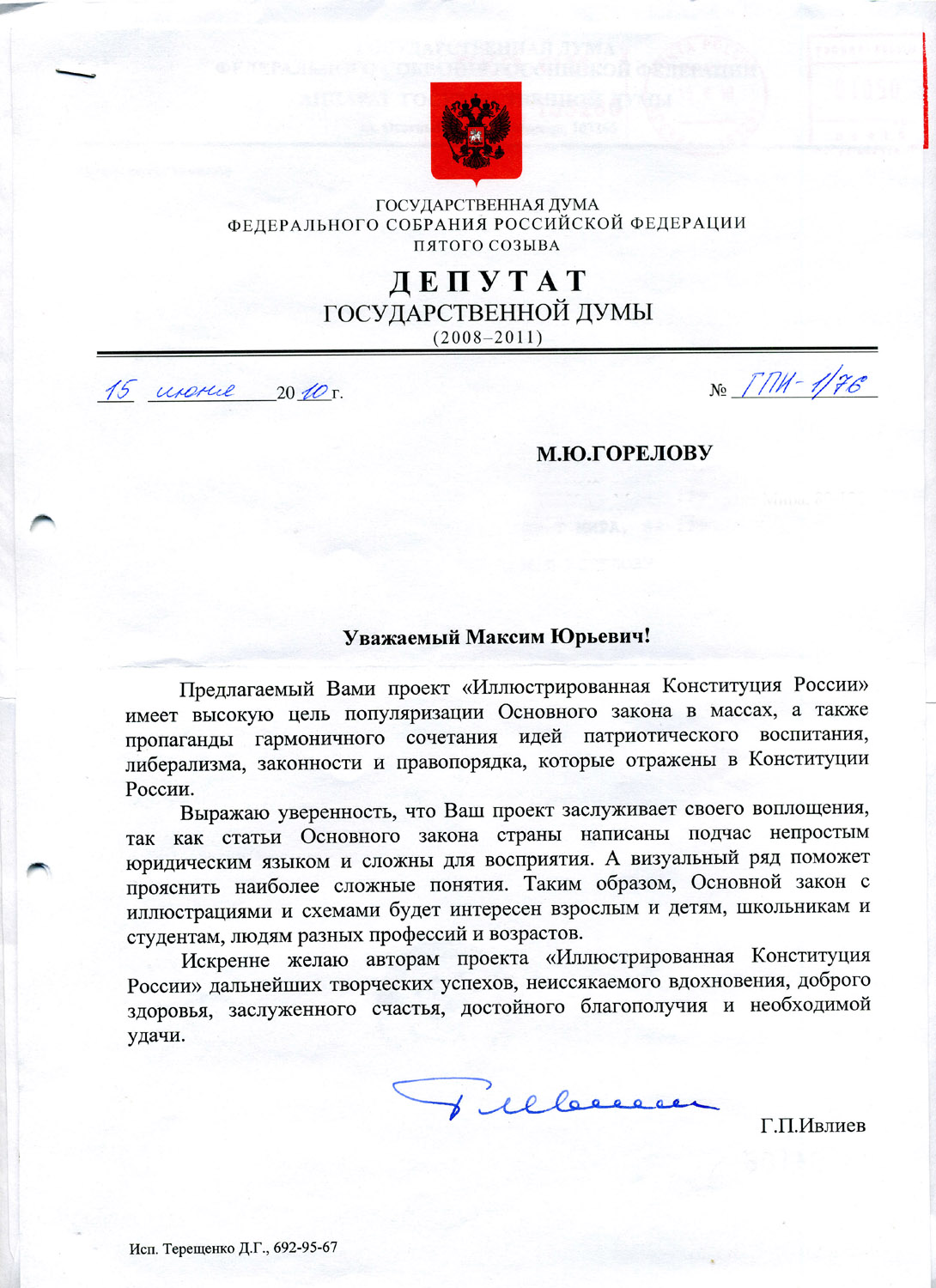 Письмо Депутата ГД Григория Петровича Ивлиева одному из авторов книги Иллюстрированная Конституция России.